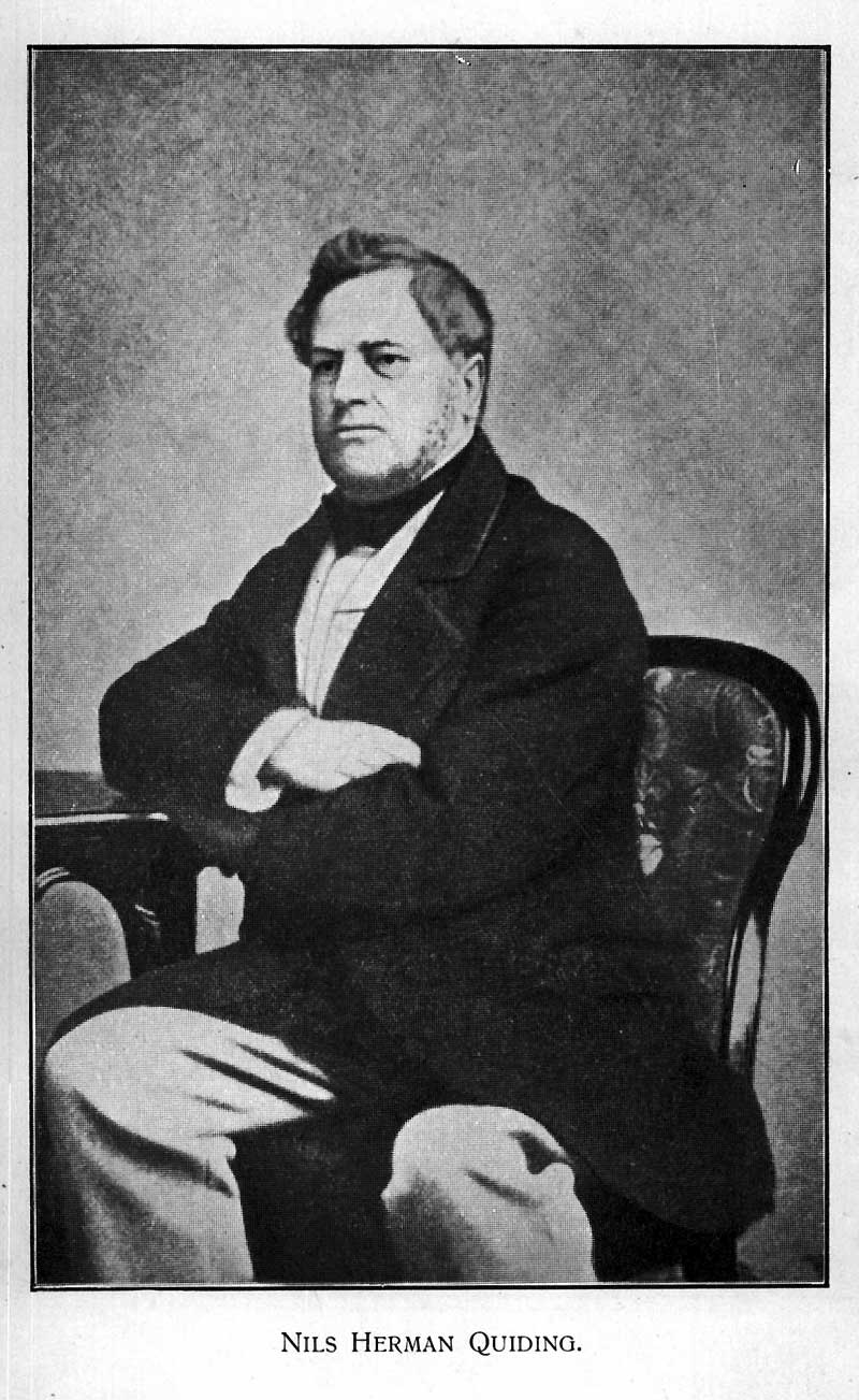 Nils Herman Quiding